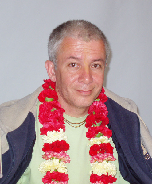 Чайтанья Чандра Чаран Дас